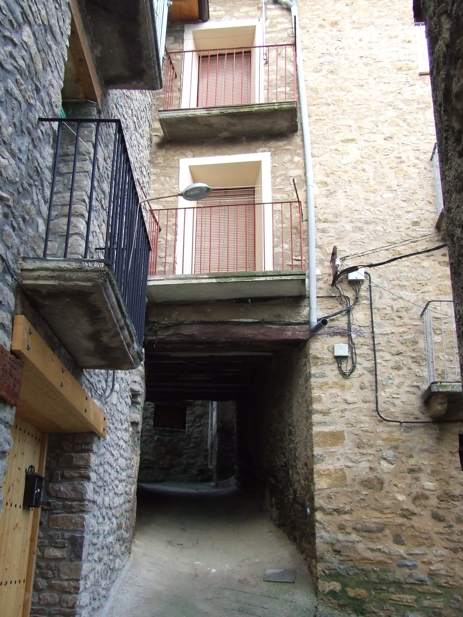 Un dels portals d'Aransís (Gavet de la Conca, Pallars Jussà)